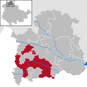 Stadt Bleicherode im Landkreis Nordhausen, Thüringen